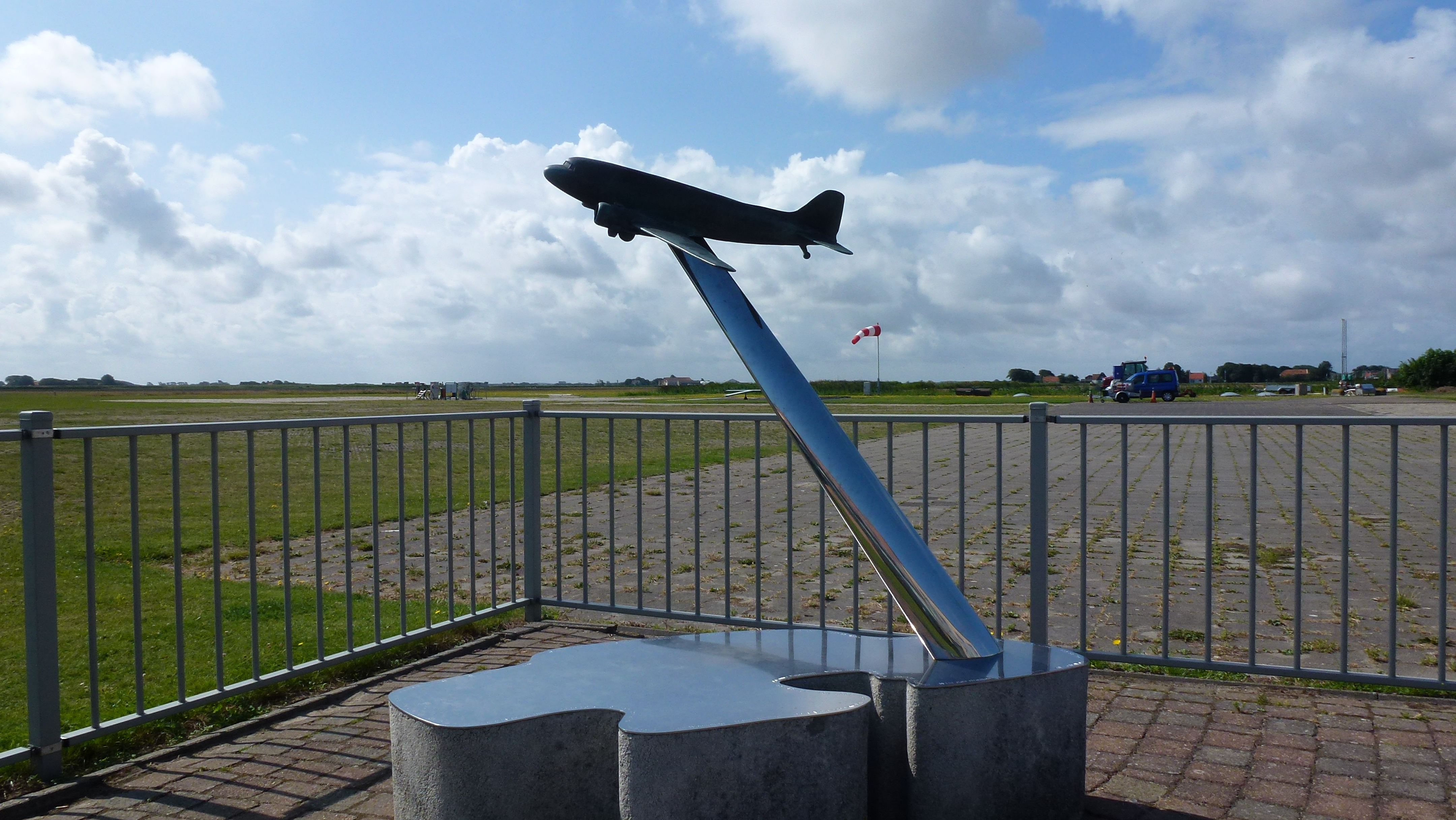 Dakotaramp Dakota monument, Texel Airport. Bronzen beeld van een DC-3 boven een in roestvast staal uitgevoerd silhouet van het eiland Texel met daarop de namen van de 32 omgekomen inzittenden. Plaquette: Ter herinnering aan de vliegramp op de Waddenzee, 25 september 1996